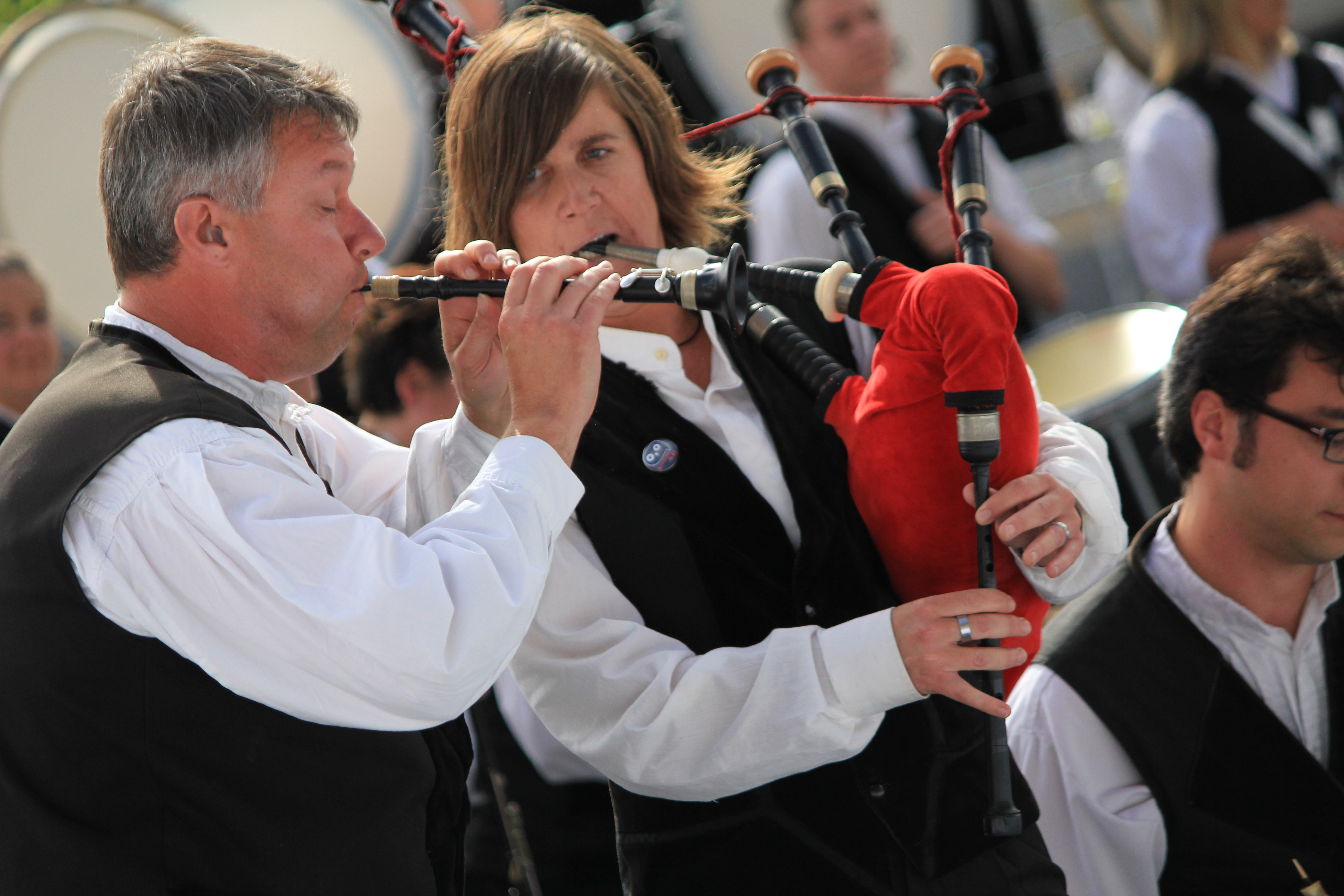 La Kevrenn Alre d'Auray lors de l'épreuve d'été du championnat national de bagadoù de 1ère division, organisé dans le cadre du Festival interceltique de Lorient, France. A la bombarde Fabrice Lothodé, "chef sonneur" en 1993, puis de 1999 à 2011. A la cornemuse, Marie Le Cam, présidente de la Kevrenn Alre depuis 2012.